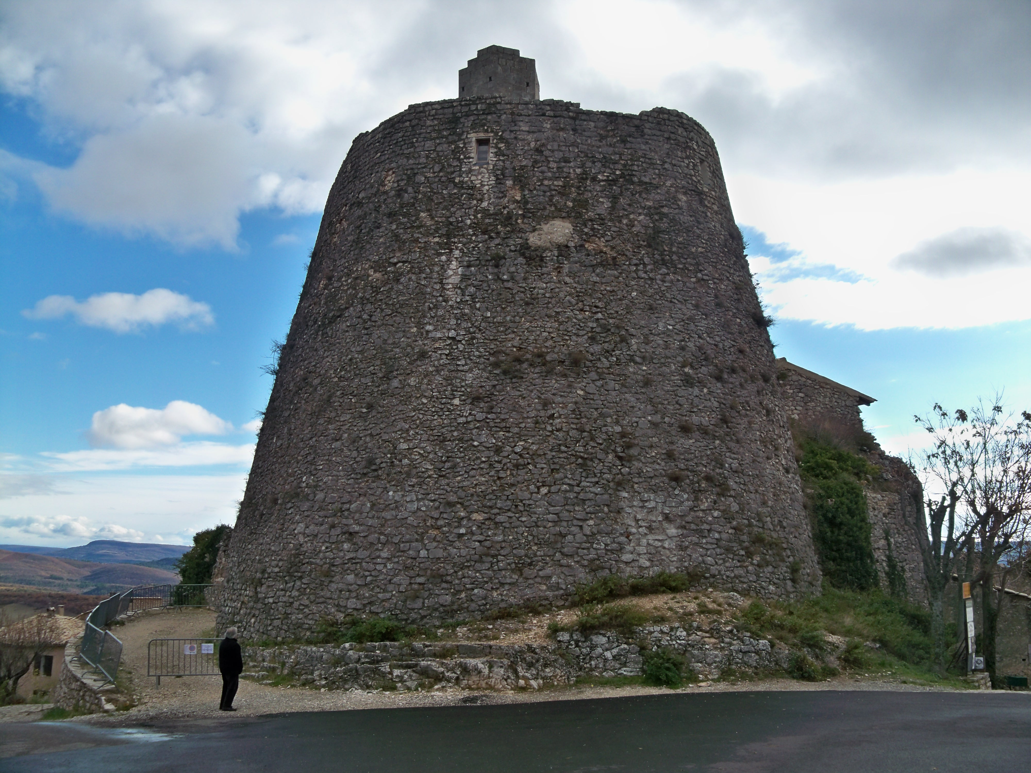 La Rotonde de Simiane (04)